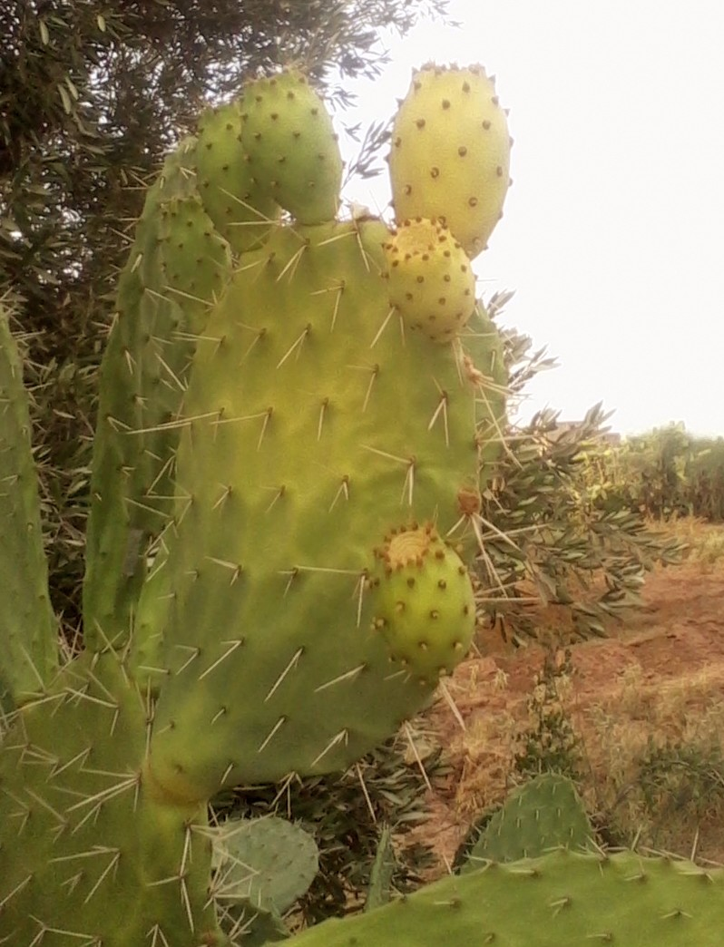 فاكهة الصبار بدوار أولاد بوكرين بقلعة السراغنة